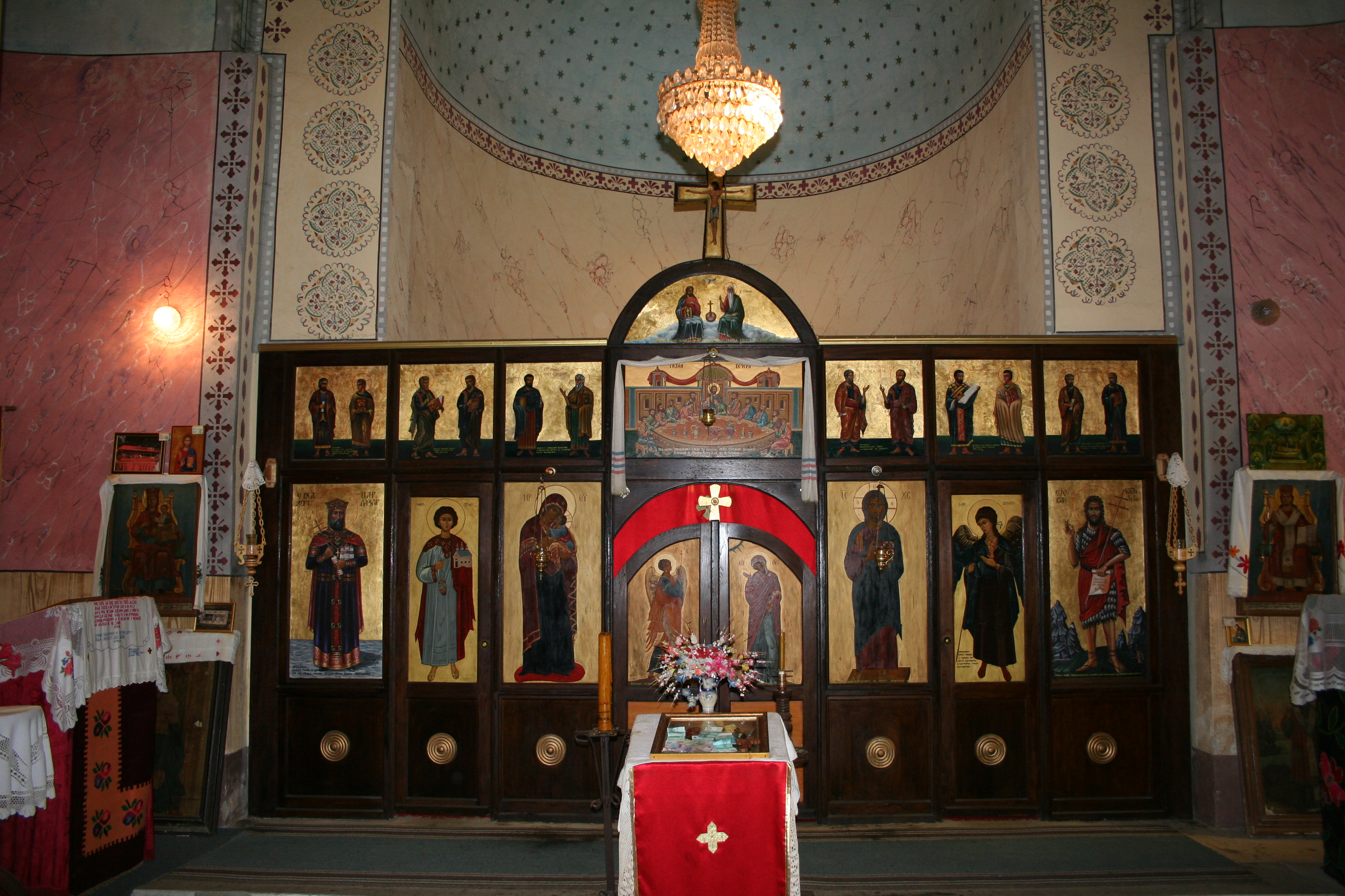 Crkva Sv. Trojice, Donja Trešnjica